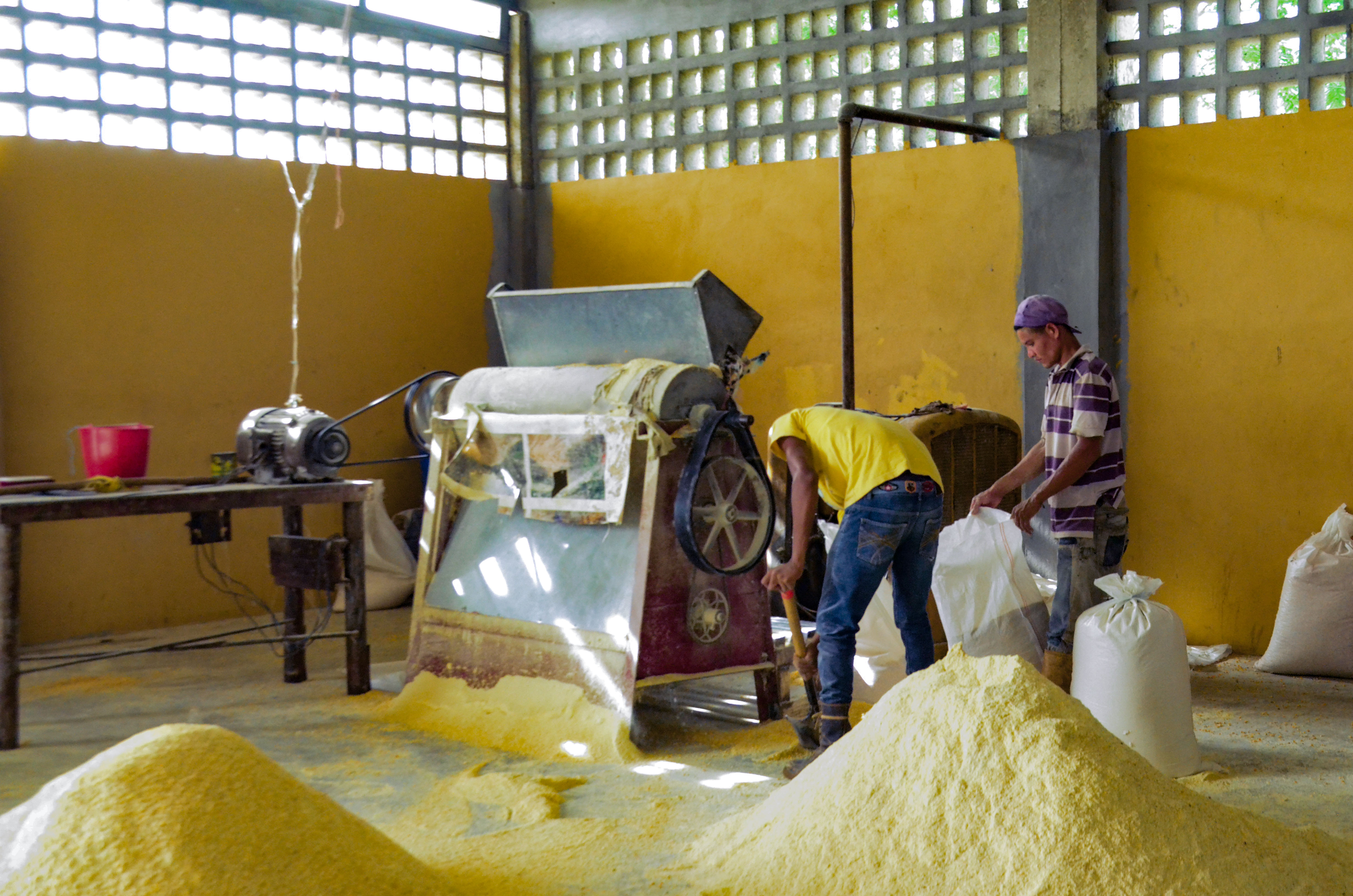 Planta procesadora de harina de maíz. Yaguaraparo, Estado Sucre/ Venezuela